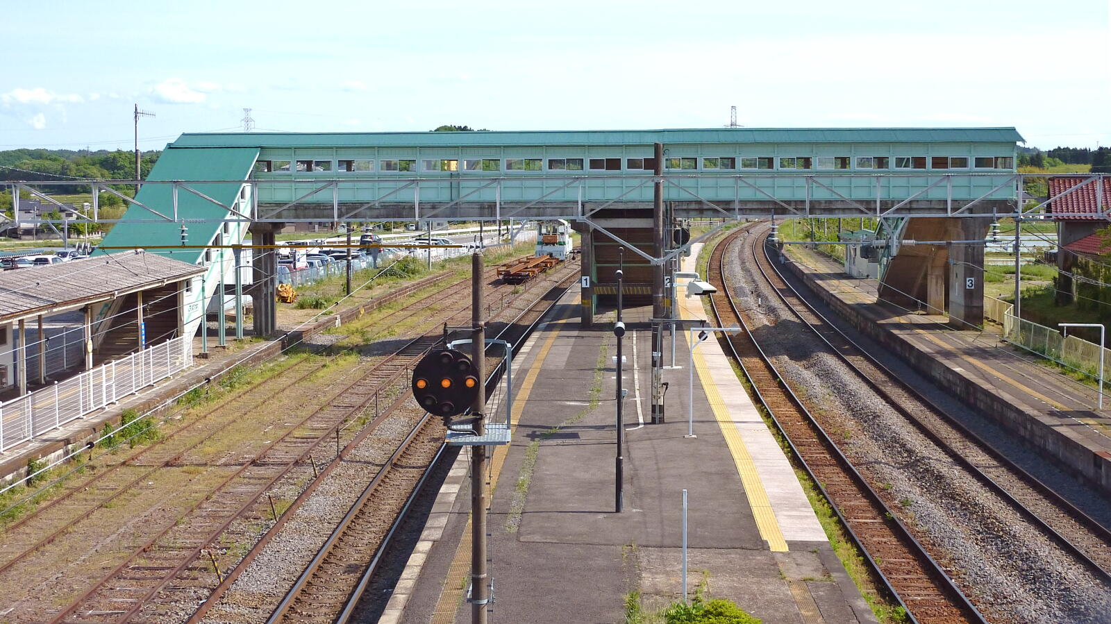 東北本線松川駅（構内）